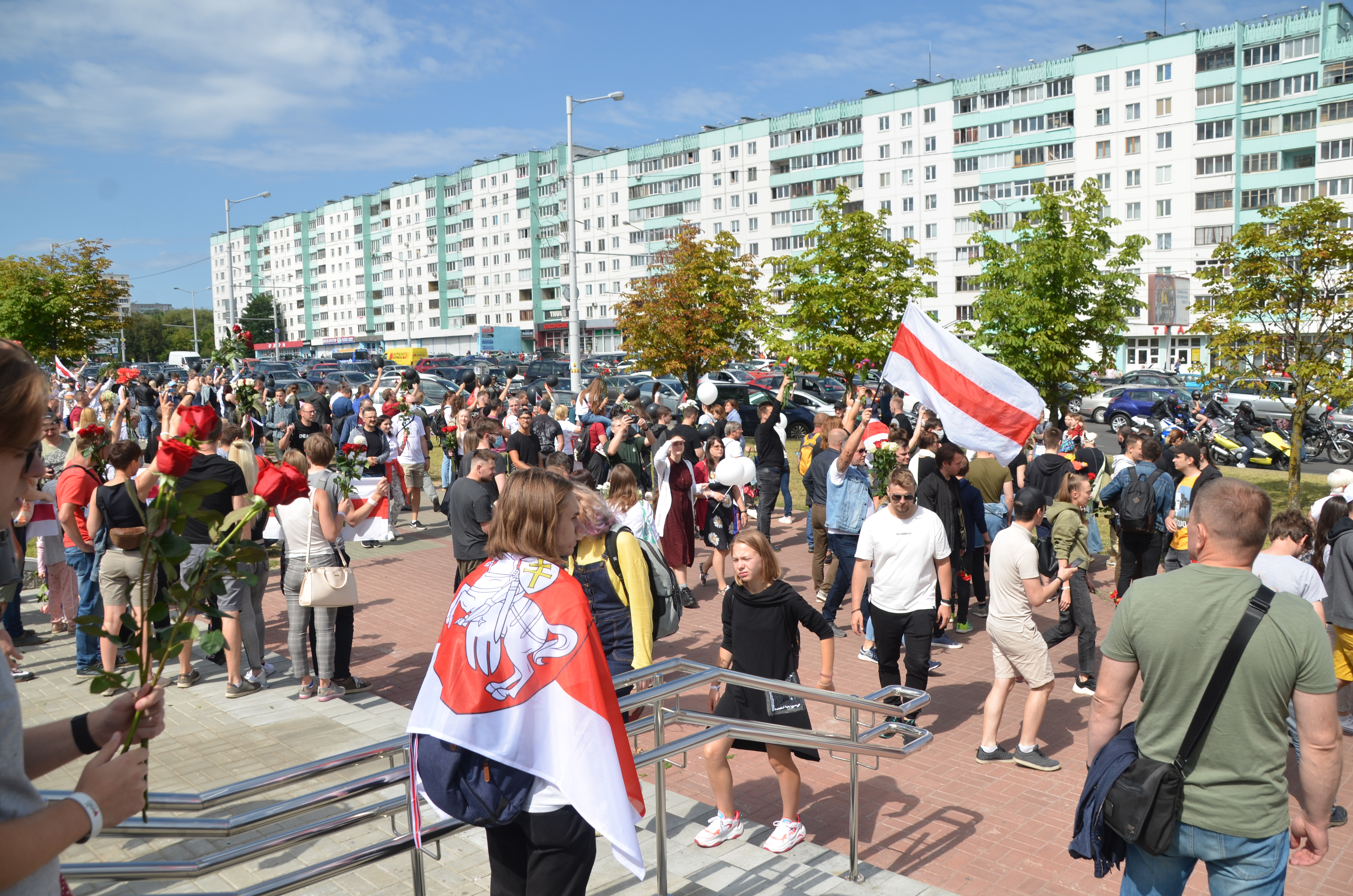 Митинг памяти Александра Тарайковского, метро Пушкинская, Минск, 15 августа 2020